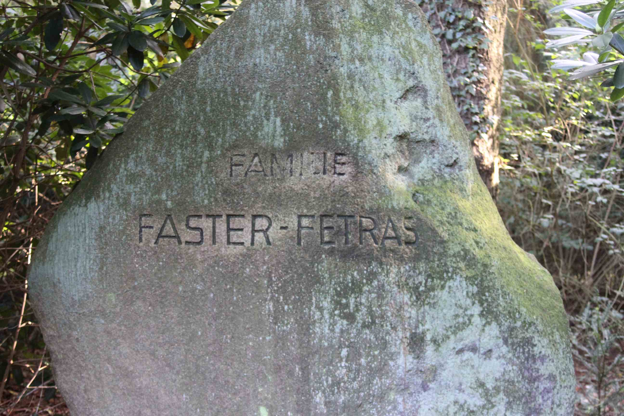 Oscar Fetrás, geboren als Otto Friedrich Faster (* 16. Februar 1854 in Hamburg; † 10. Januar 1931 ebenda),[1] war ein deutscher Komponist und Dirigent.